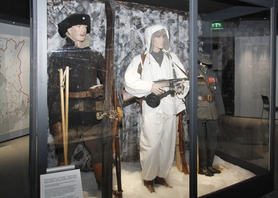 Kaksi talvisodan sotilasta ja Simo Häyhän univormu